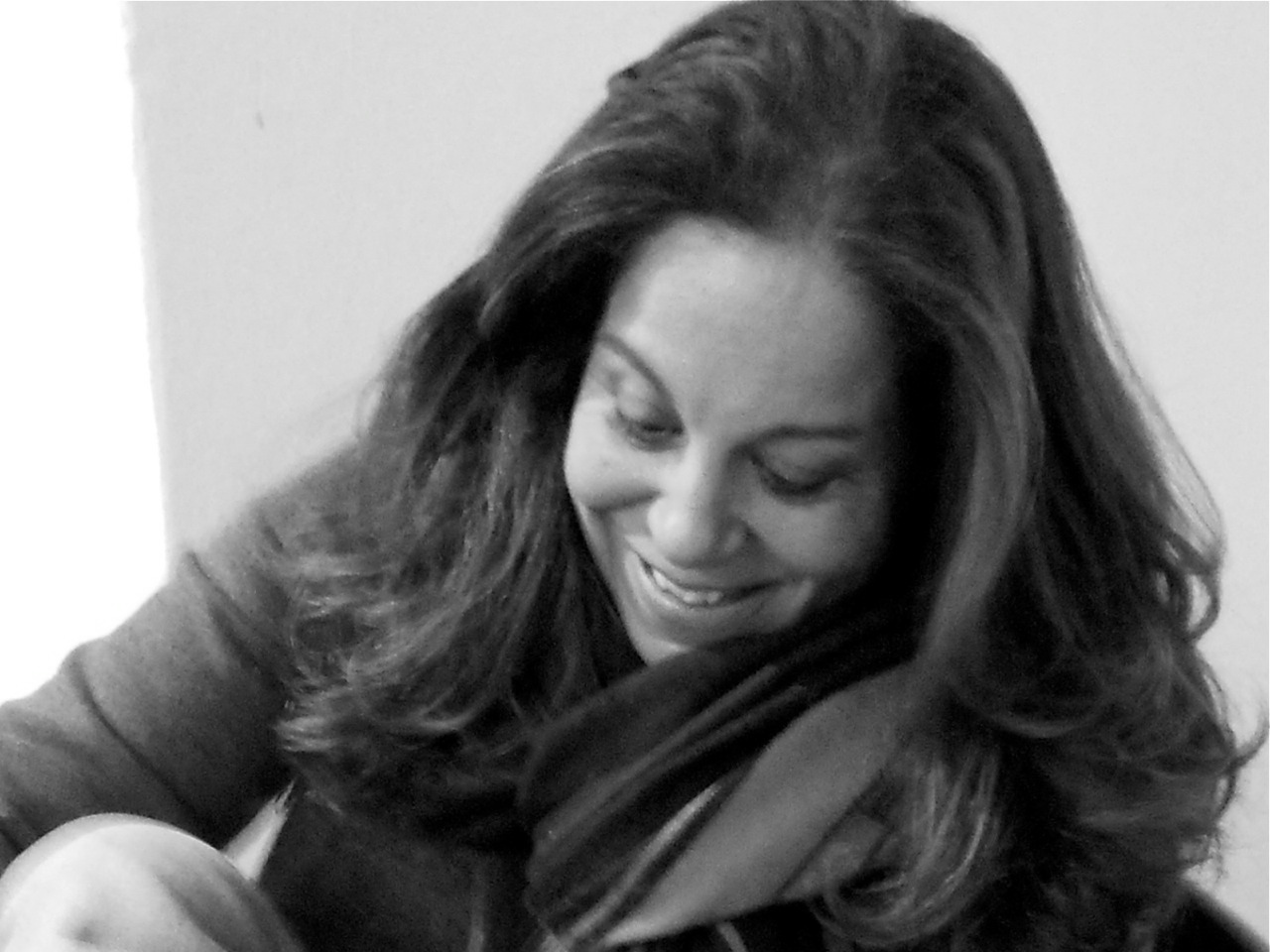 ritratto Mia Lecomte